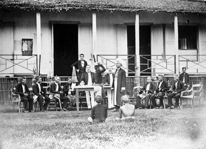 Repronegatief. Net als dat op Java en Sumatra lange tijd het geval was, was de scheiding der machten op Borneo onvolledig. Een Nederlands bestuursambtenaar was bij de zogeheten residentiegerechten en magistraatsgerechten voorzitter van het rechtsprekend college. Hij werd veelal geassisteerd door inheemse bestuurders. Daarboven stonden Raden van Justitie die wel geheel uit juristen bestonden. In de Buitengewesten (alles buiten Java) was de ambtenaar van het Binnenlands Bestuur ook voorzitter van de landraad, dat is de inheemse rechtbank. Op de foto zien we in het midden als voorzitter J.J. Meijer, Assistent-Resident van Amoentai. (P. Boomgaard, 2001). Eedafneming bij lokale inwoners te Barabai, met in het midden J.J. Meijer, de assistent-resident van Amoetai (residentie Zuidoost Borneo) Eedafneming bij inlanders, barabai, Hoeloe Soengai, Borneo's Zuider-en oosterafdeling, ca. 1875 Eedafneming bij inlanders, barabai, Hoeloe Soengai, Borneo's Zuider-en Oosterafdeling, ca. 1875